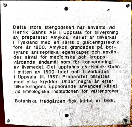 Eget foto